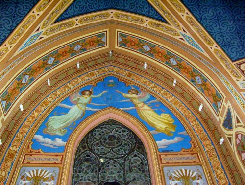 Detalhe da cúpula do altar de Nossa Senhora do Rosário na Catedral Nossa Senhora do Desterro, Jundiaí,SP-Brasil, com fresco de Arnaldo Mecozzi.